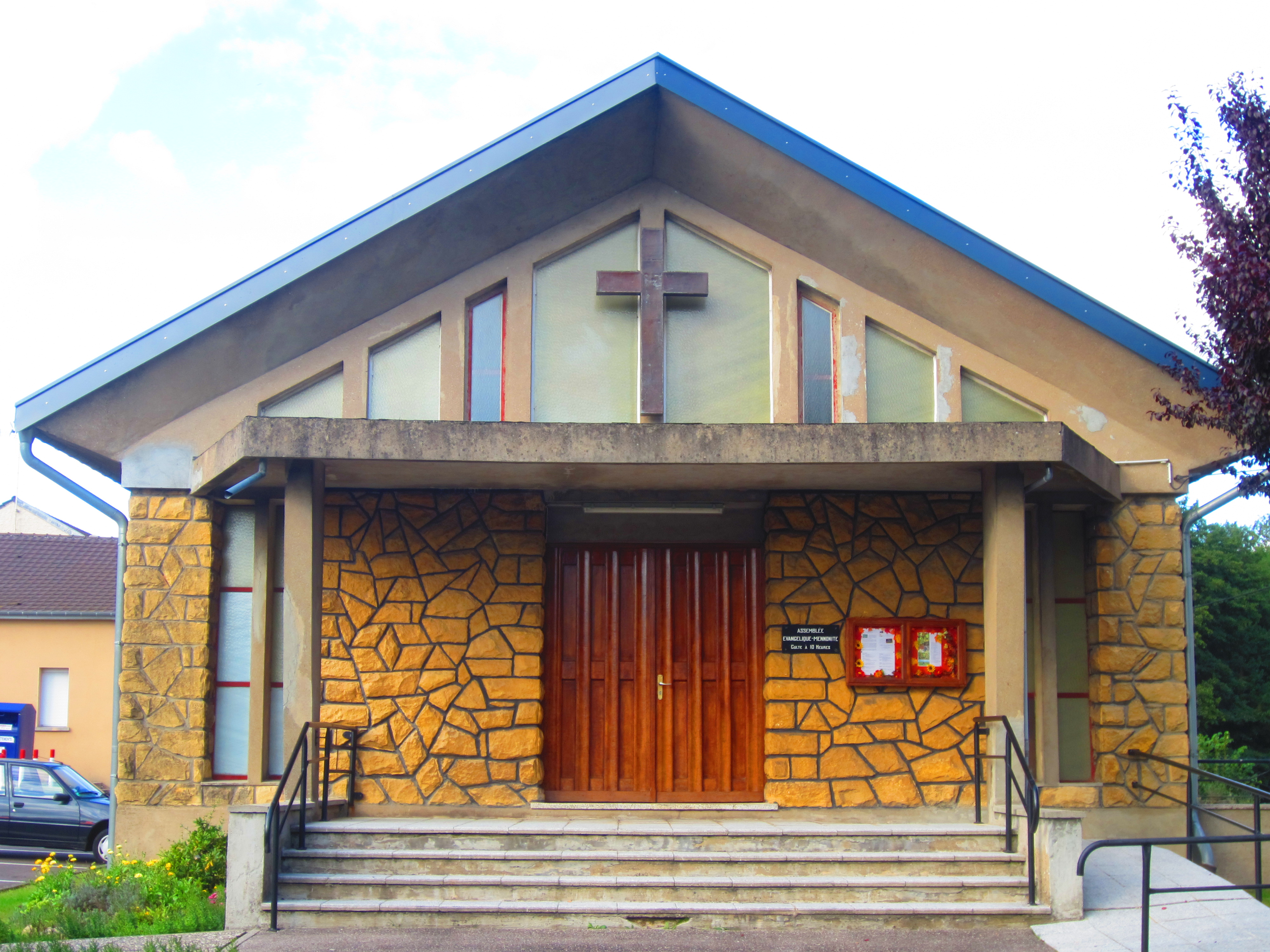 Temple Diesen